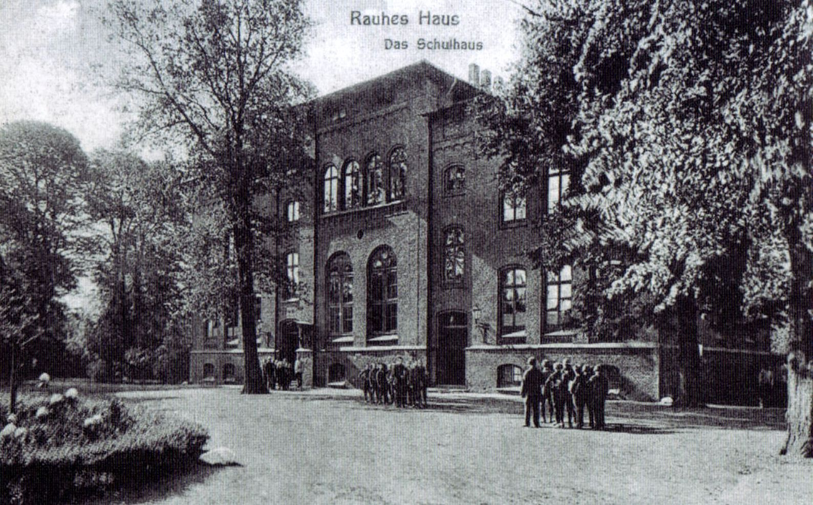 Schulhaus "Paulinum" des Rauhen Hauses, erbaut 1874, um 1910